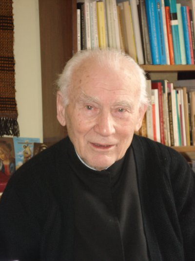 ks. prof. Tadeusz Ślipko SJ, foto: Paweł Piotrowski/Wydawnictwo PETRUS